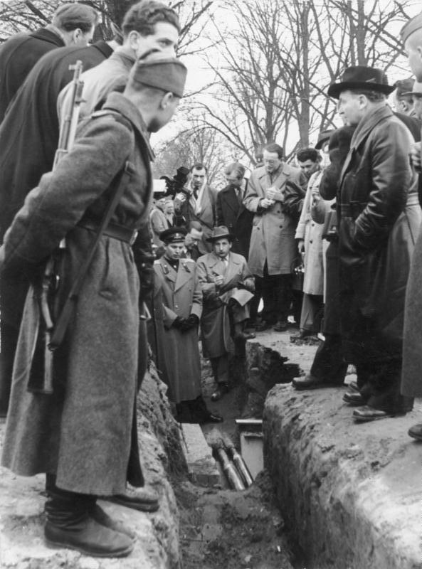 ADN-Zentralbild/Kollektiv 25.4.1956 USA-Spionagetunnel unter DDR-Gebiet Auf Einladung des amtierenden Militarkommandanten des sowjetischen Sektors von Berlin, Oberst Kozjuba, besichtigten am 24.4.1956 Vertreter der westlichen Presse den Spionage-Tunnel im Gebiet von Alt-Glienicke. UBz: Voller Interesse hören die westlichen Pressevertreter den Ausführungen der sowjetischen Offiziere zu.